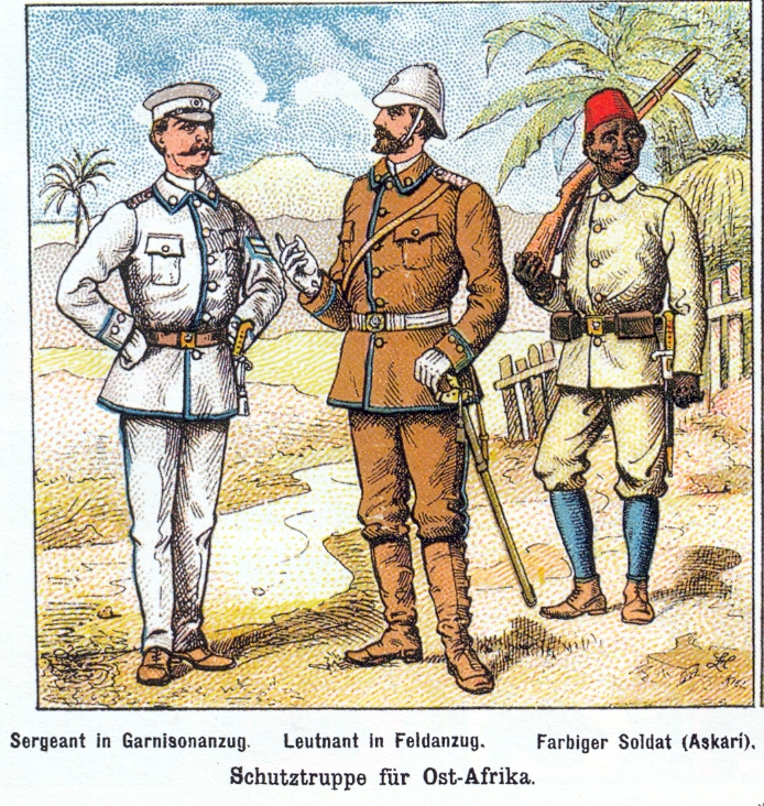 Uniformen der deutschen Schutztruppen für Ost-Afrika